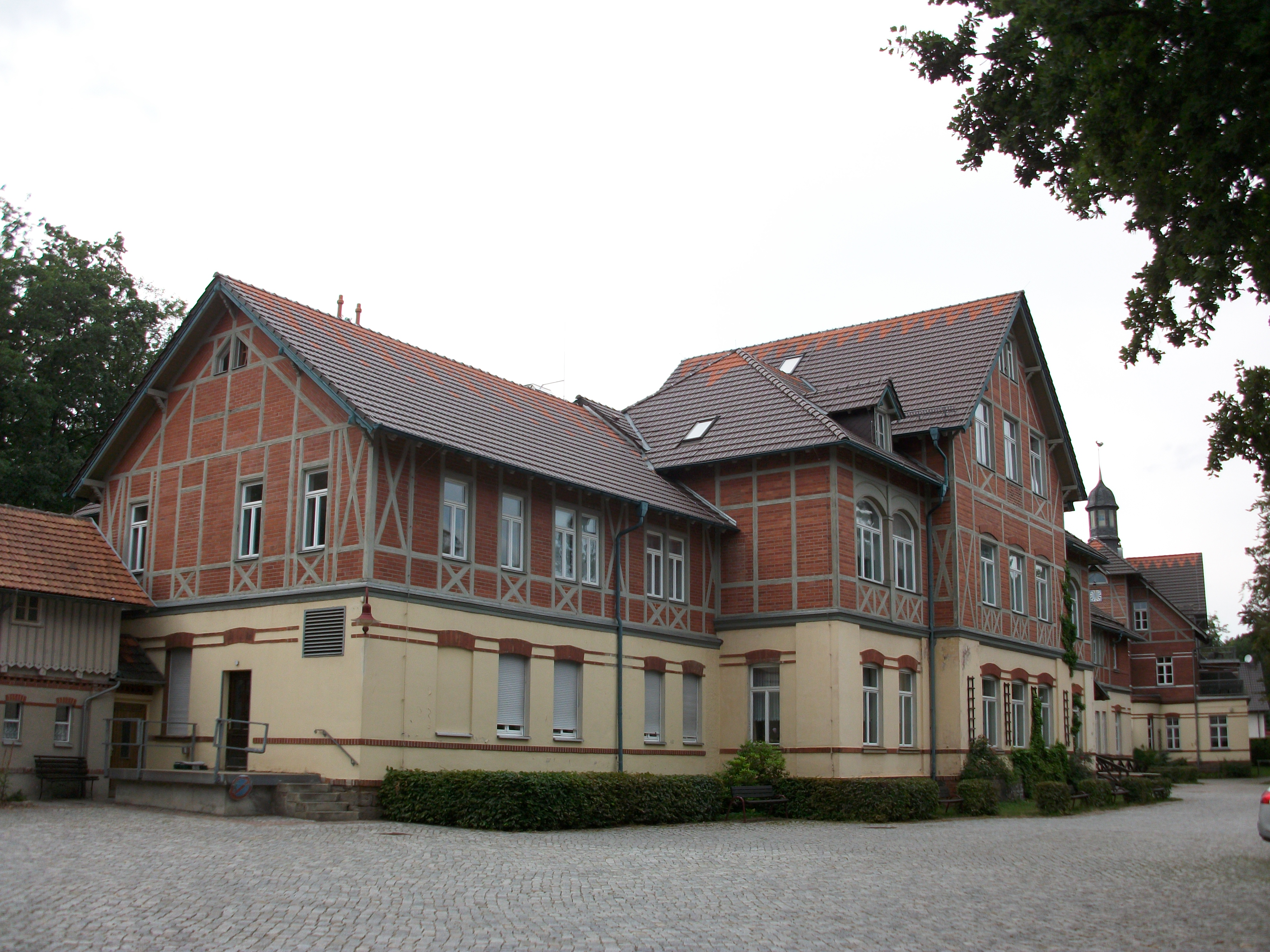 Bethlehemstift Hohenstein-Ernstthal, Paul-Lange-Haus